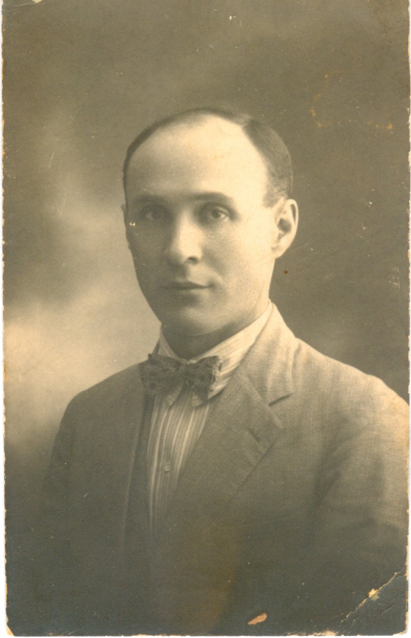 ד"ר משה הר אבן, רופא פסיכואנליטקאי ומראשוני הרוויזיוניסטים בארץ ישראל, רופא בבית החולים גהה